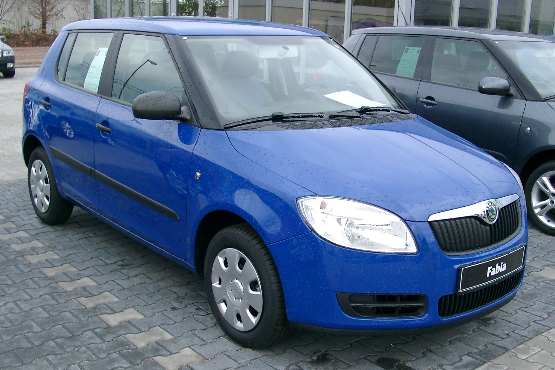 Škoda Fabia